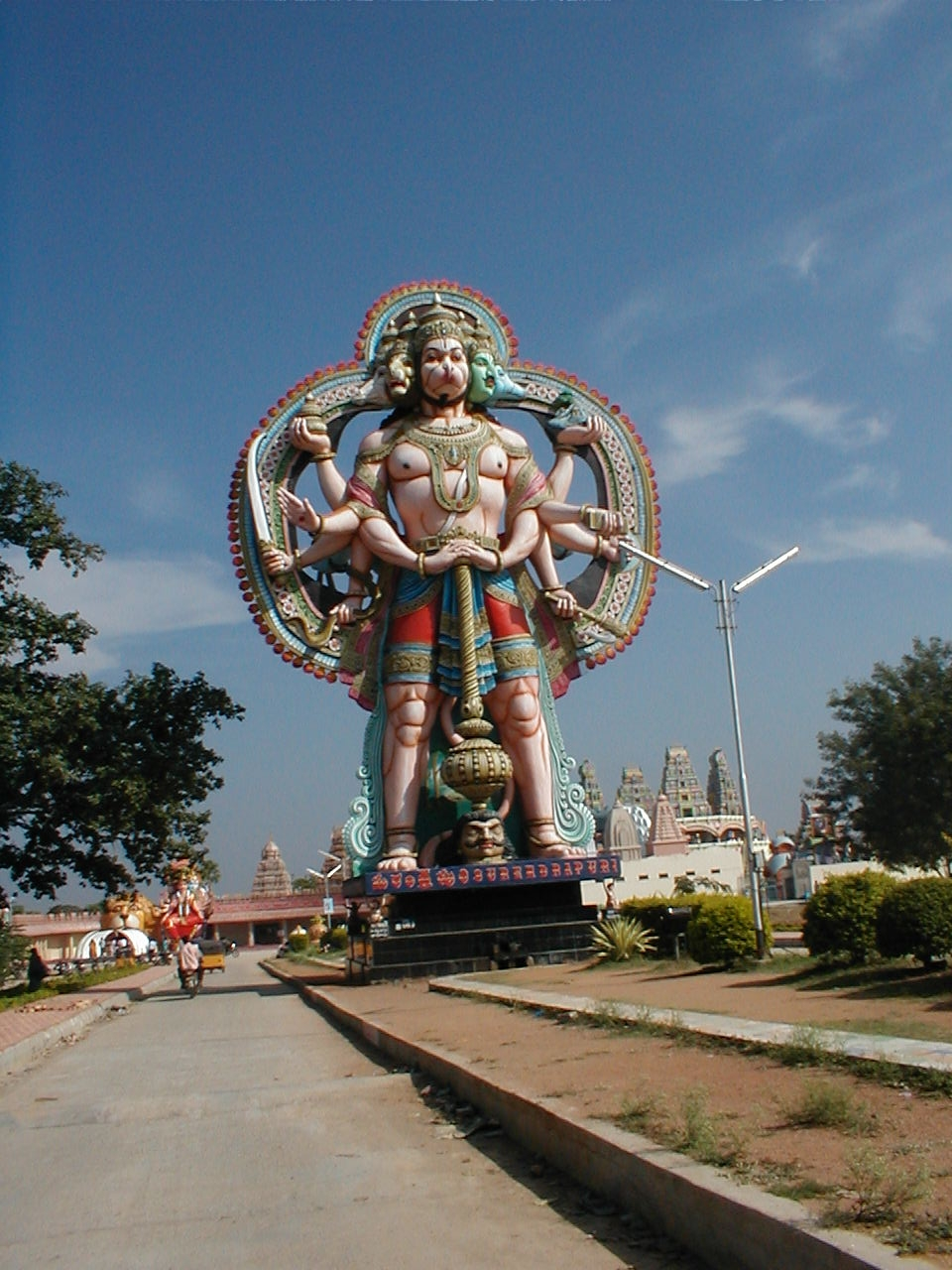 పంచముఖ ఆంజనేయ స్వామి,సురేంద్రపురి. ముందు నుండి కనపించే పంచ ముఖ హనుమ.